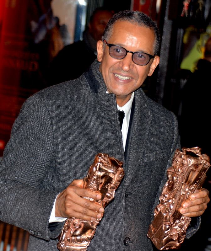 Abderrahmane Sissako à la cérémonie des César